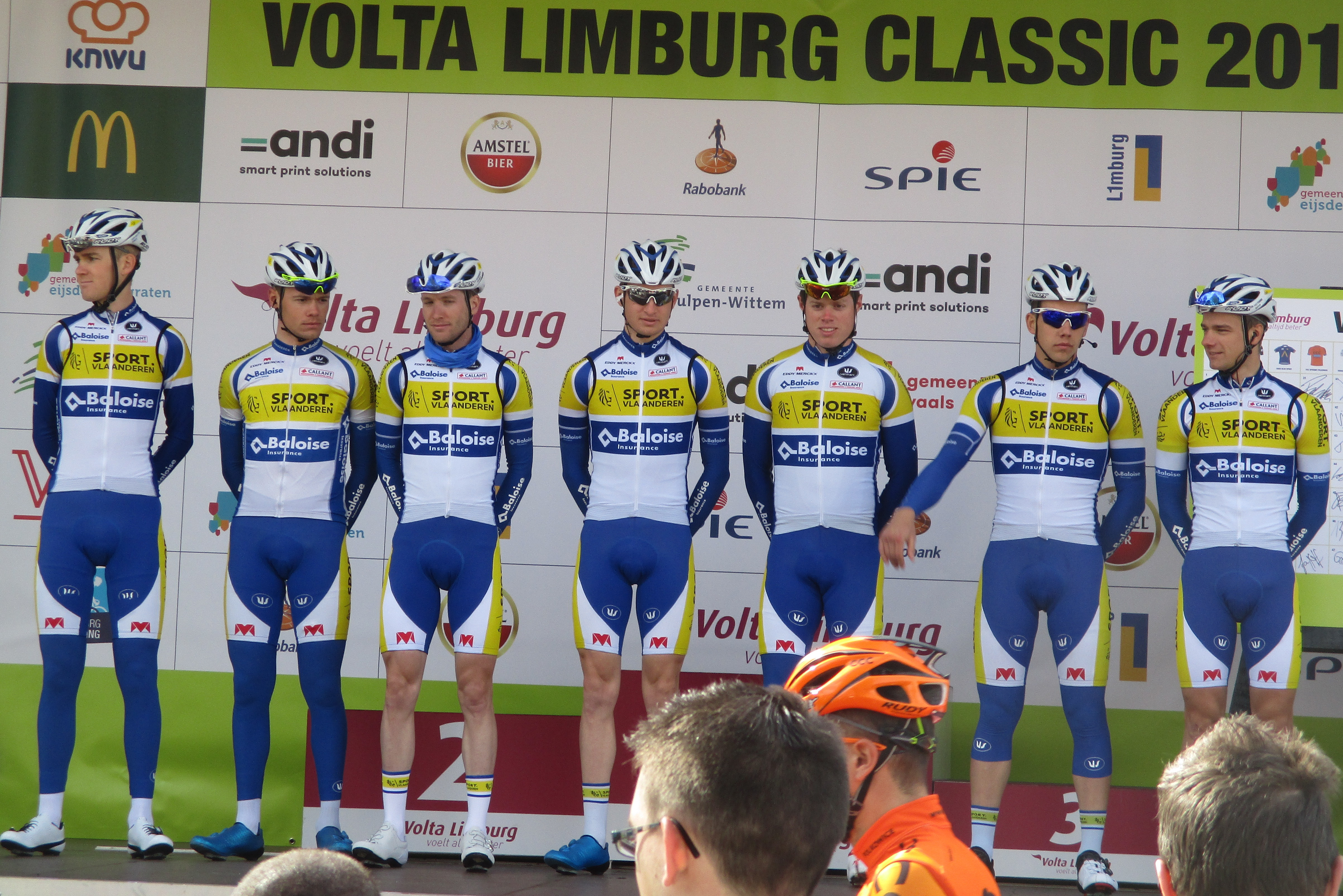 Start van de Volta Limburg Classic 2018 in de Diepstraat in Eijsden